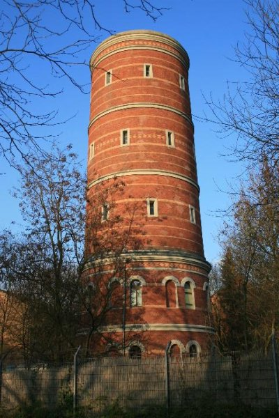 Denkmal Nr. 220 in Viersen-Dülken